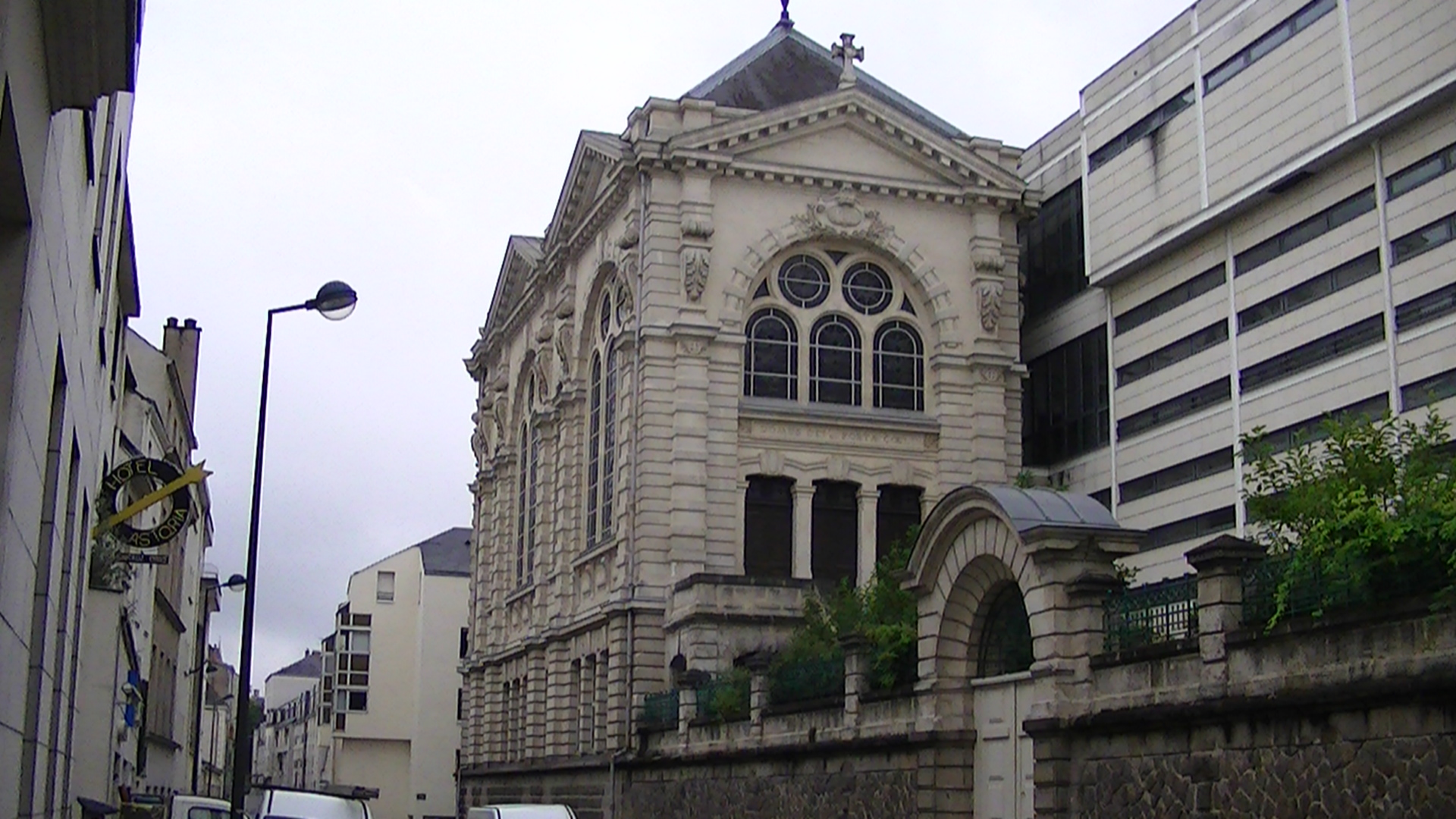 2 rue Saint-François, chapelle du lycée Georges-Clemenceau, Nantes.